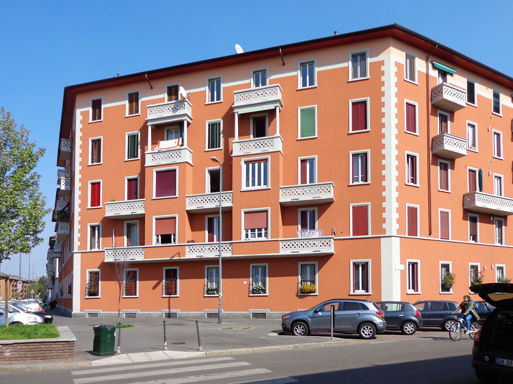 Milano, vista del quartiere ex-ICP "Villapizzone". Il fabbricato d'angolo fra via Bramantino e via Jacopino da Tradate.